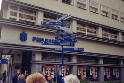 Wegweiser an der Ulica Zwyciectwa in der Gleiwitzer Innenstadt, die in die Richtungen der Partnerstädte zeigt. (2004)